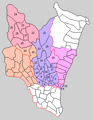 久慈郡の町村